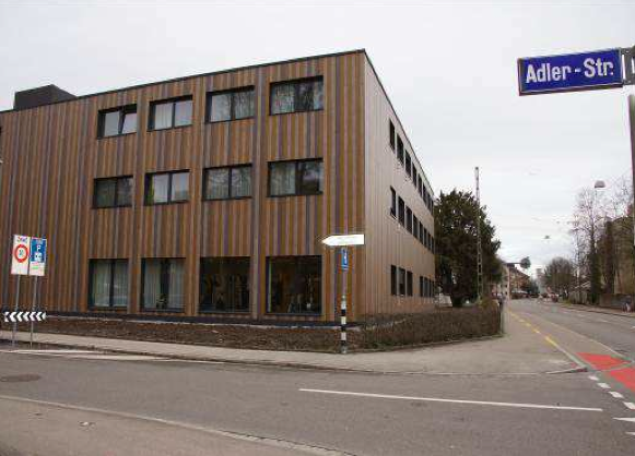 Foto des Provisoriums des Alterszentrum Adlergarten Winterthur, Kanton ZH, Schweiz.